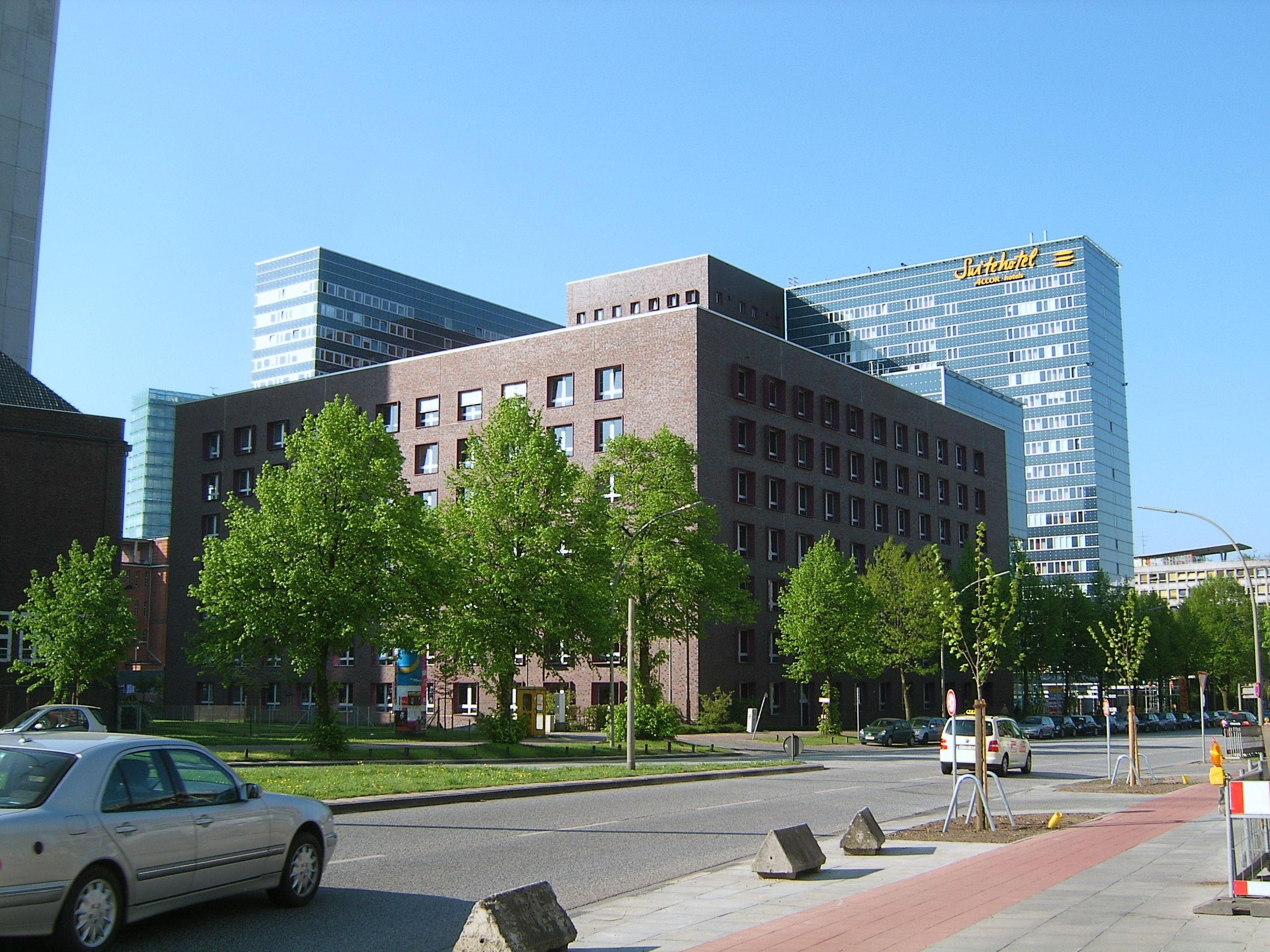 Haus der Gerichte (vorne) und Suite-Hotel im Lübeckertordamm in St. Georg.